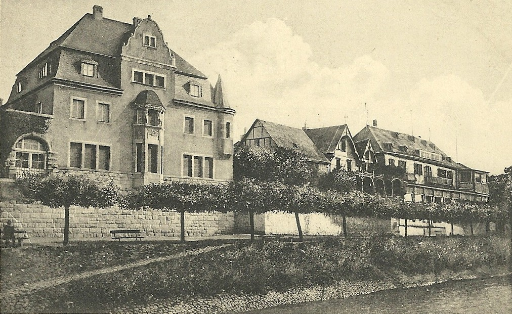 Unkel, Rheinufer mit Haus Ernst Profitlich und Yates, 1912.